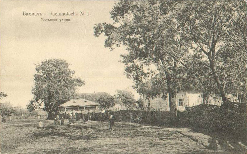 Бахмач. Велика вулиця. Поштівка №1.